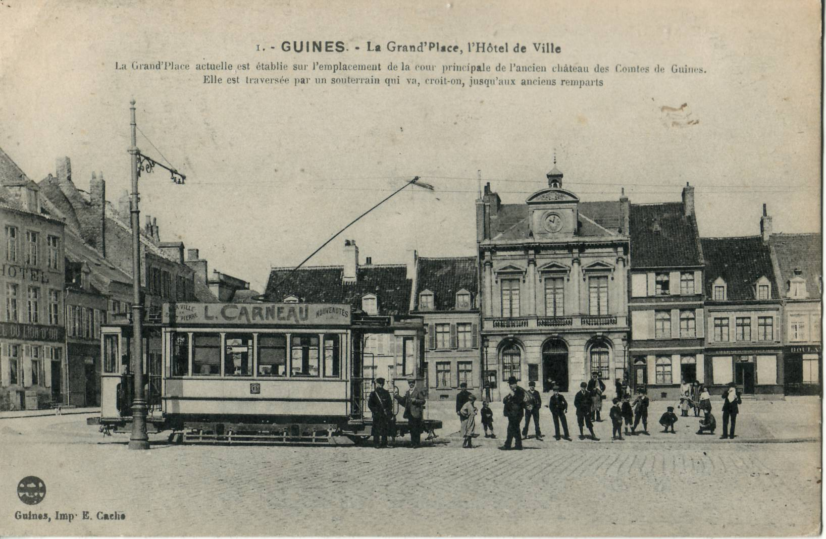 Carte postale ancienne éditée par E. Cache à Guînes, n°1 : GUÎNES - La Grand'Place, l'Hôtel de Ville. "La Grand'Place actuelle est établie sur l'emplacement de la cour principale de l'ancien château des Comtes de Guînes. Elle est traversée par un souterrain qui va, croit-on, jusqu'aux anciens remparts"